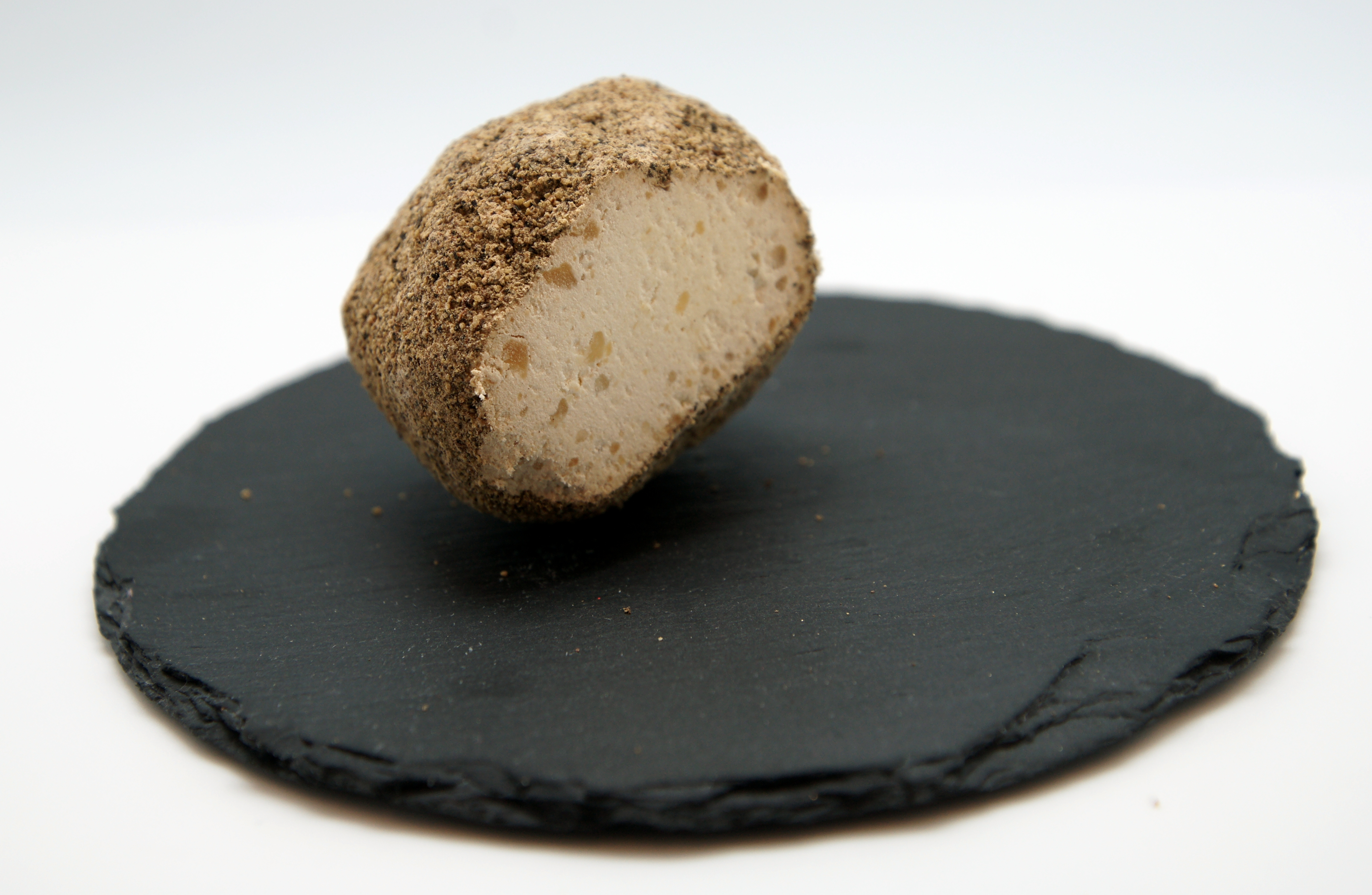 Boule de Belp rouge, fromage suisse sec / Roter Belper Knolle - Schweizer Chäs/ Belper ball (red) - a dry Swiss cheese.